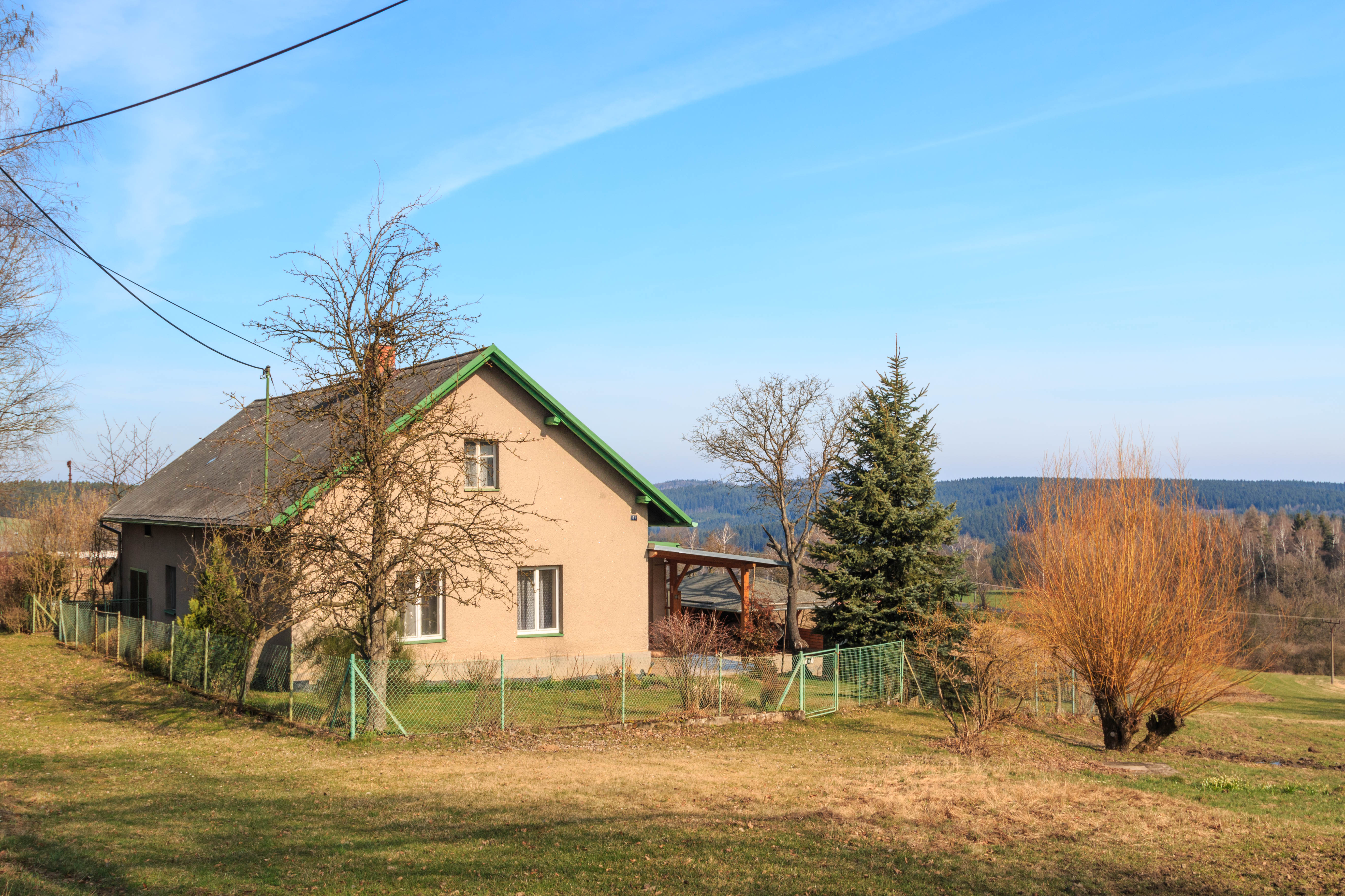 Osada Nohavice u Rušinova - dům čp. 21